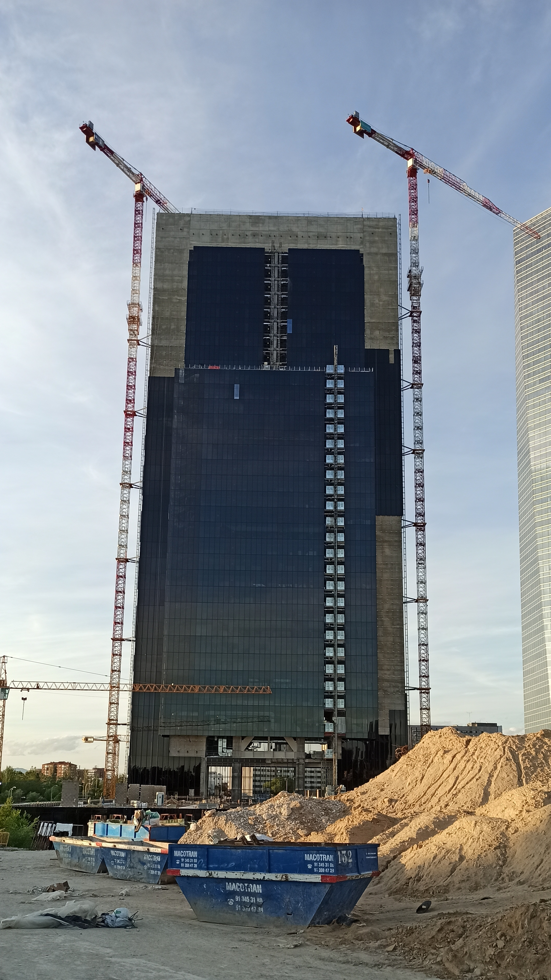 Torre Caleido